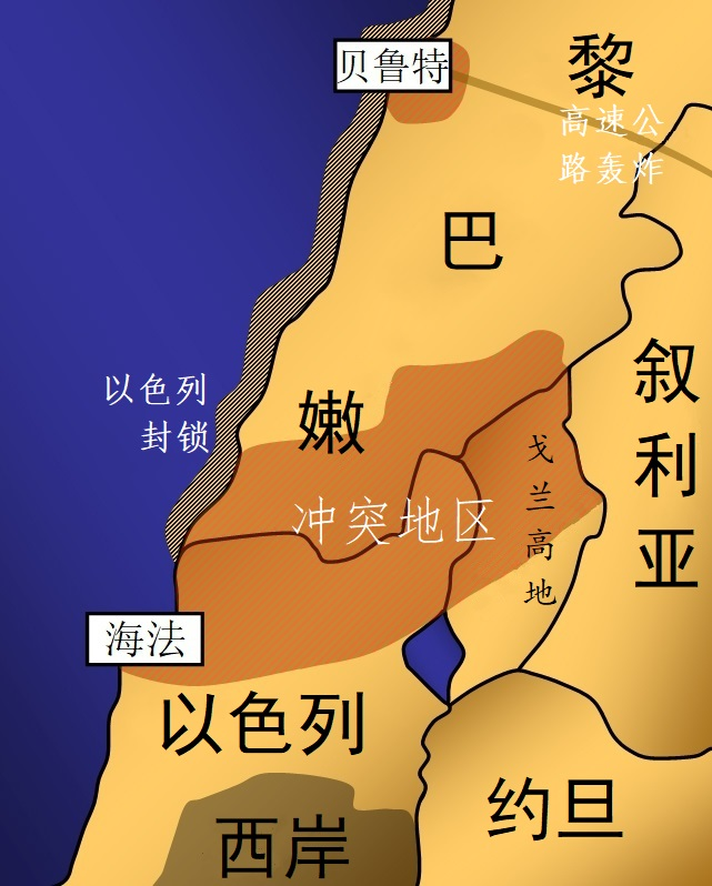 以黎衝突地圖